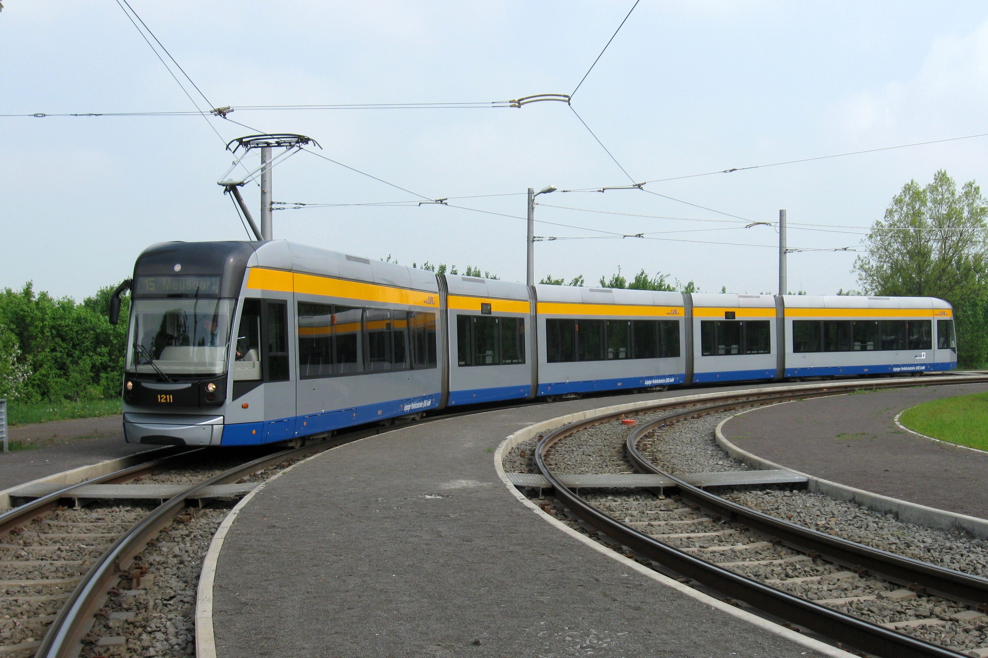 Straßenbahn Leipzig: NGT12-LEI, Miltitz